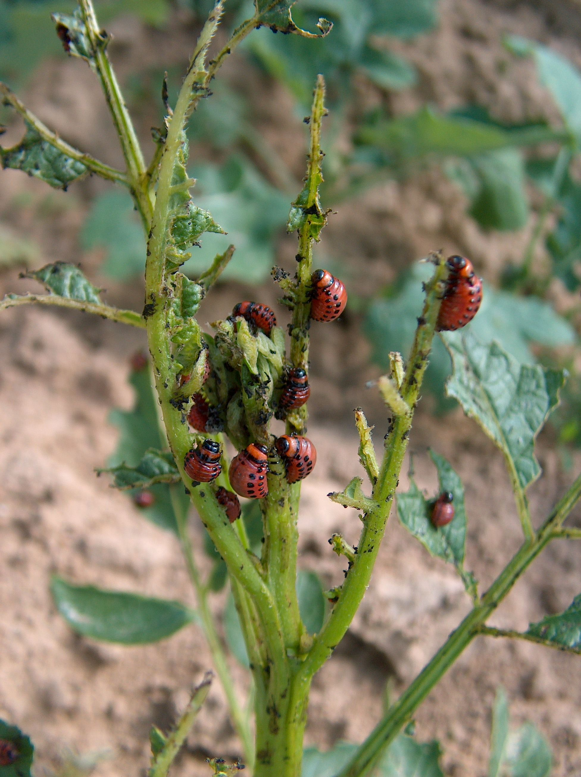 Kartoffelkäferlarven einer stark abgefressenen Kartoffelpflanze